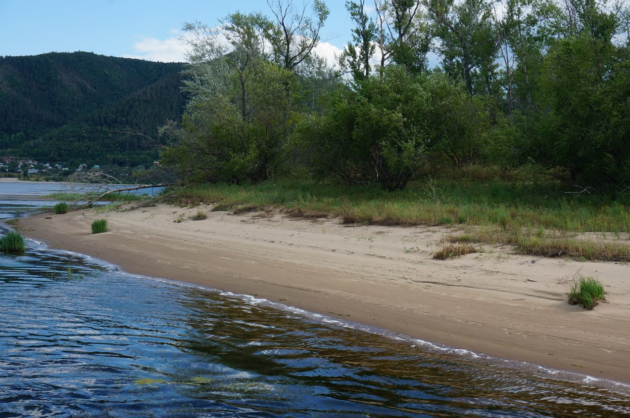 Берег волсжкого острова Серёдыш, Жигулёвский заповедник.